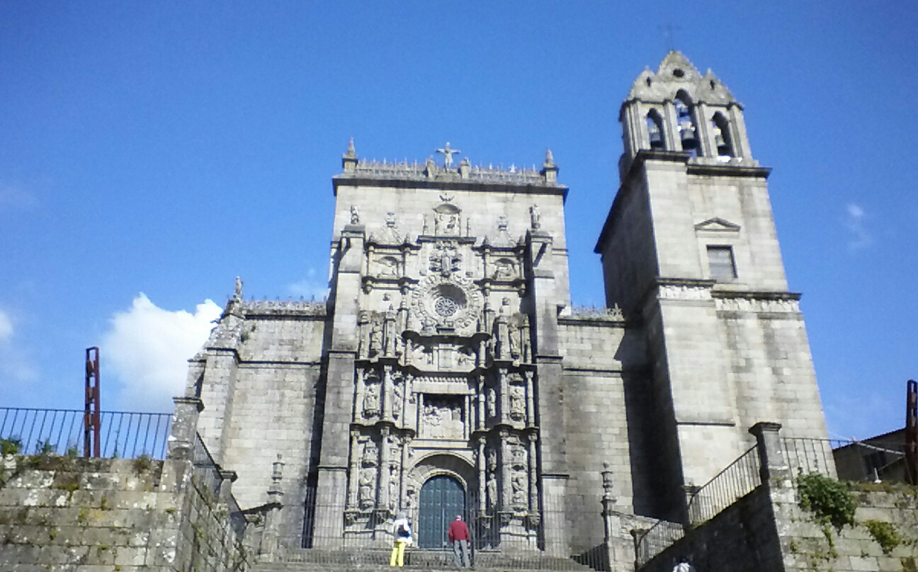 Portada plateresca y torre de la Basílica de Santa María La Mayor en Pontevedra Capital